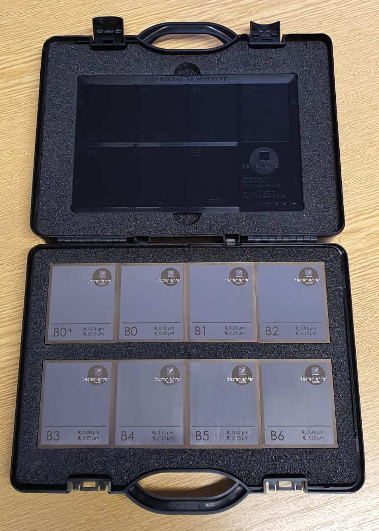 Rugotest im Koffer mit 8 handpolierten Referenzflächen